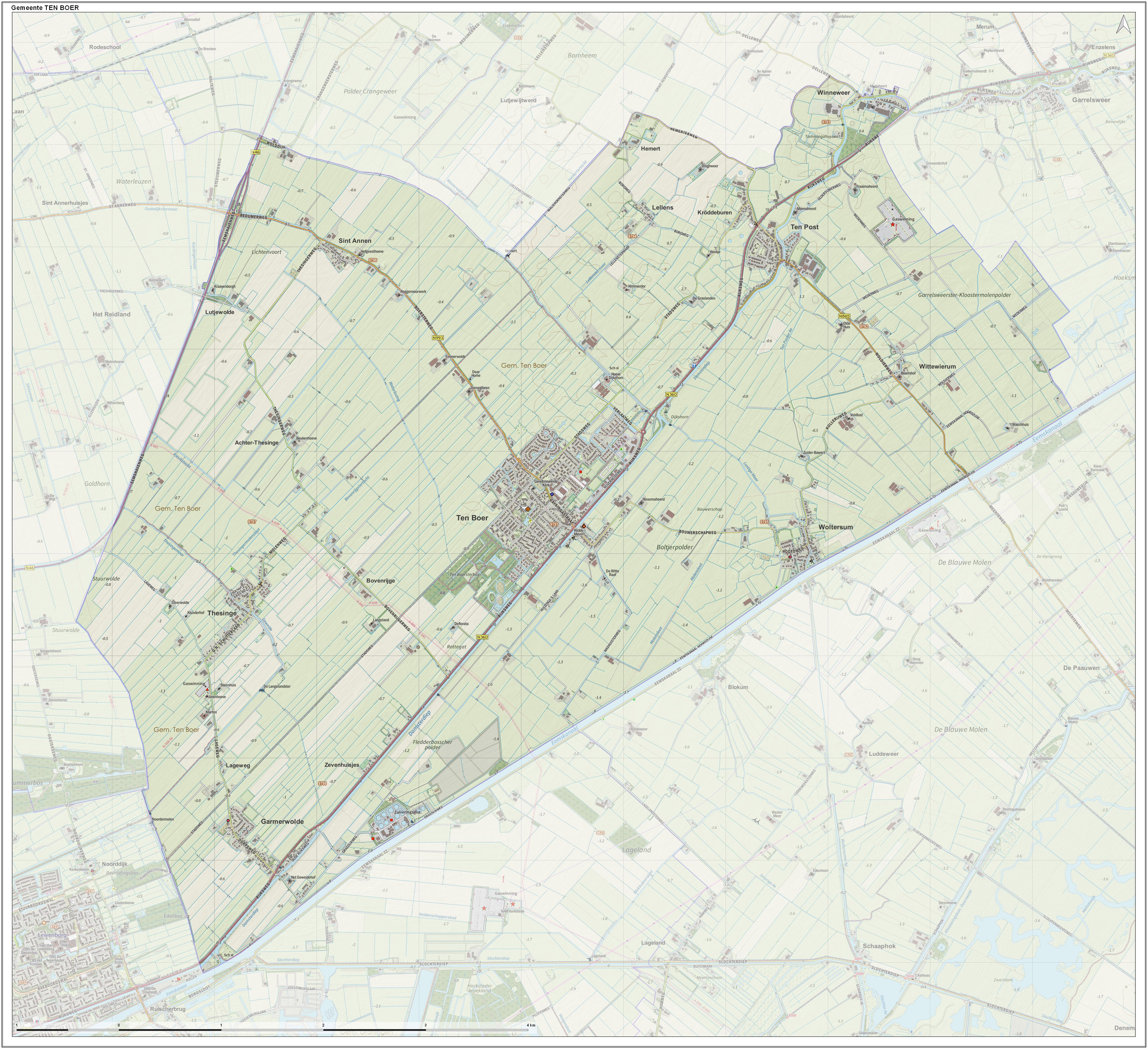 Topografische gemeentekaart. Resolutie: 400 pixels/km. Kaartbeeld samengesteld uit de open geodata van de Top10NL en Top25namen (Kadaster), Creative Commons-BY licentie. Gebouwvlakken uit open geodata BAG extract. Wegen uit de OpenStreetMap, OpenStreetMap community. Reliëfschaduw uit de Actuele Hoogtekaart AHN2. Samenstelling en kleurenschema: Jan-Willem van Aalst, met QGIS. Zie ook de Legenda.